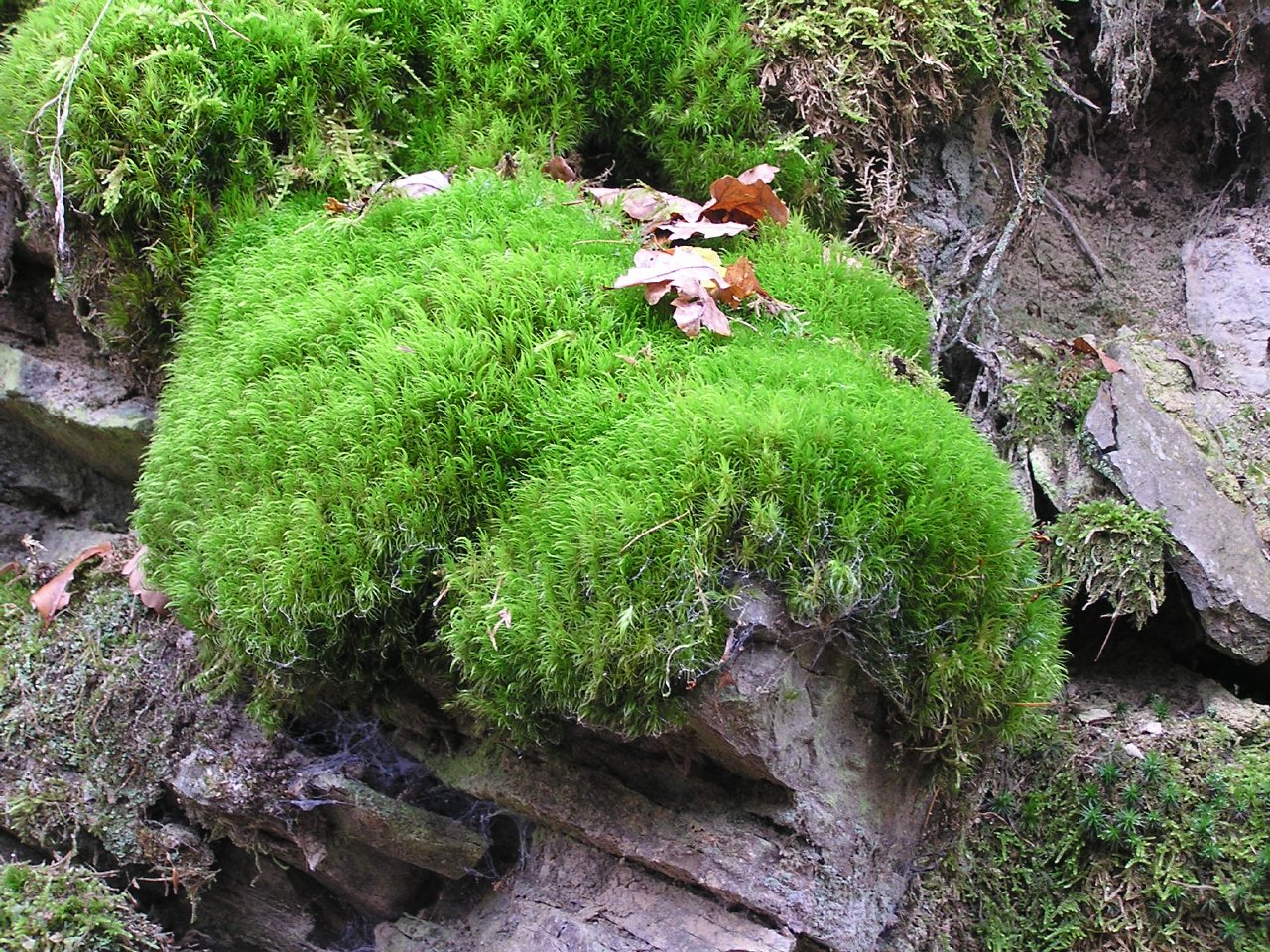 Dicranum scoparium im Ahrtal zwischen Kalenborn und Altenahr.